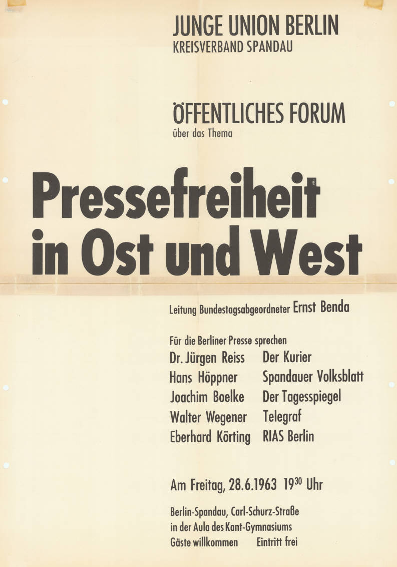 Junge Union Berlin Kreisverband Spandau Öffentliches Forum über das Thema Pressefreiheit in Ost und West Leitung Bundestagsabgeordneter Ernst Benda ...Plakatart:AnkündigungsplakatAuftraggeber:JU KV Berlin-SpandauObjekt-Signatur:10-028 : 321Bestand:Plakate von Jugendorganisationen der Parteien ( 10-028)GliederungBestand10-18:Plakate von Jugendorganisationen der Parteien (10-028) » CDU » Veranstaltungsplakate A - ZLizenz:KAS/ACDP 10-028 : 321 CC-BY-SA 3.0 DE